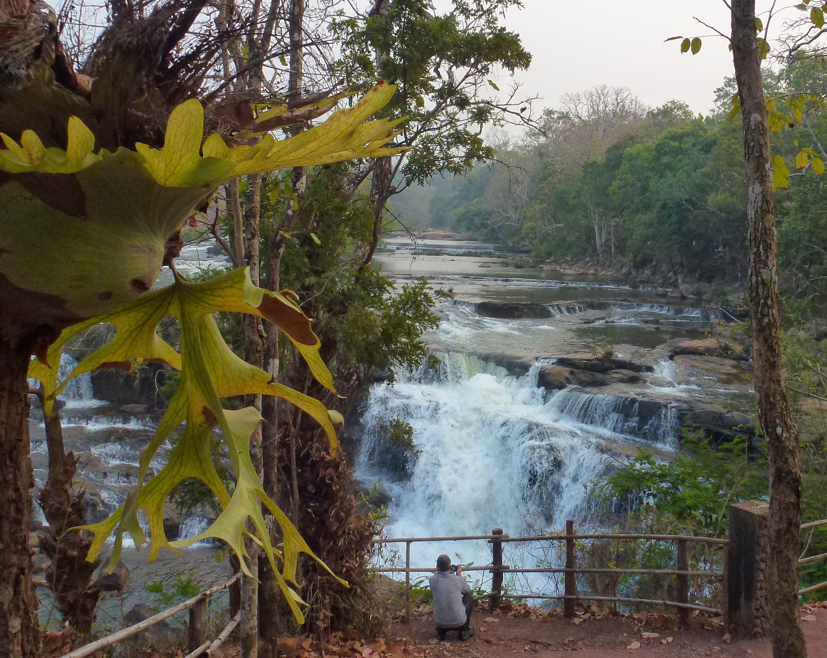 Laos, Les chutes de Tad Hang près du village de Tad Lo, sur le le Plateau des Boloven